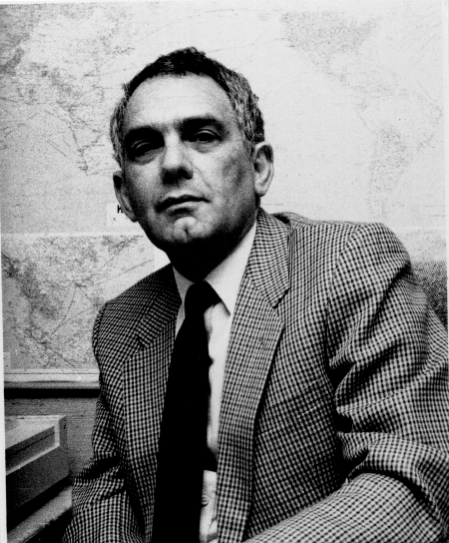 אברהם אריאל רב חובל ישראלי